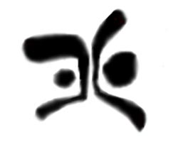 Simbolo que marca Ulukai, o herói do jogo Outcast.